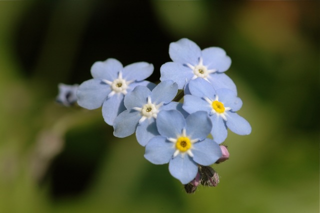 from my garden